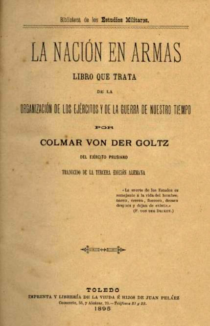 Portada de la edición española del libro LA NACIÓN EN ARMAS (1883), de Colmar von der Goltz (died 1916)